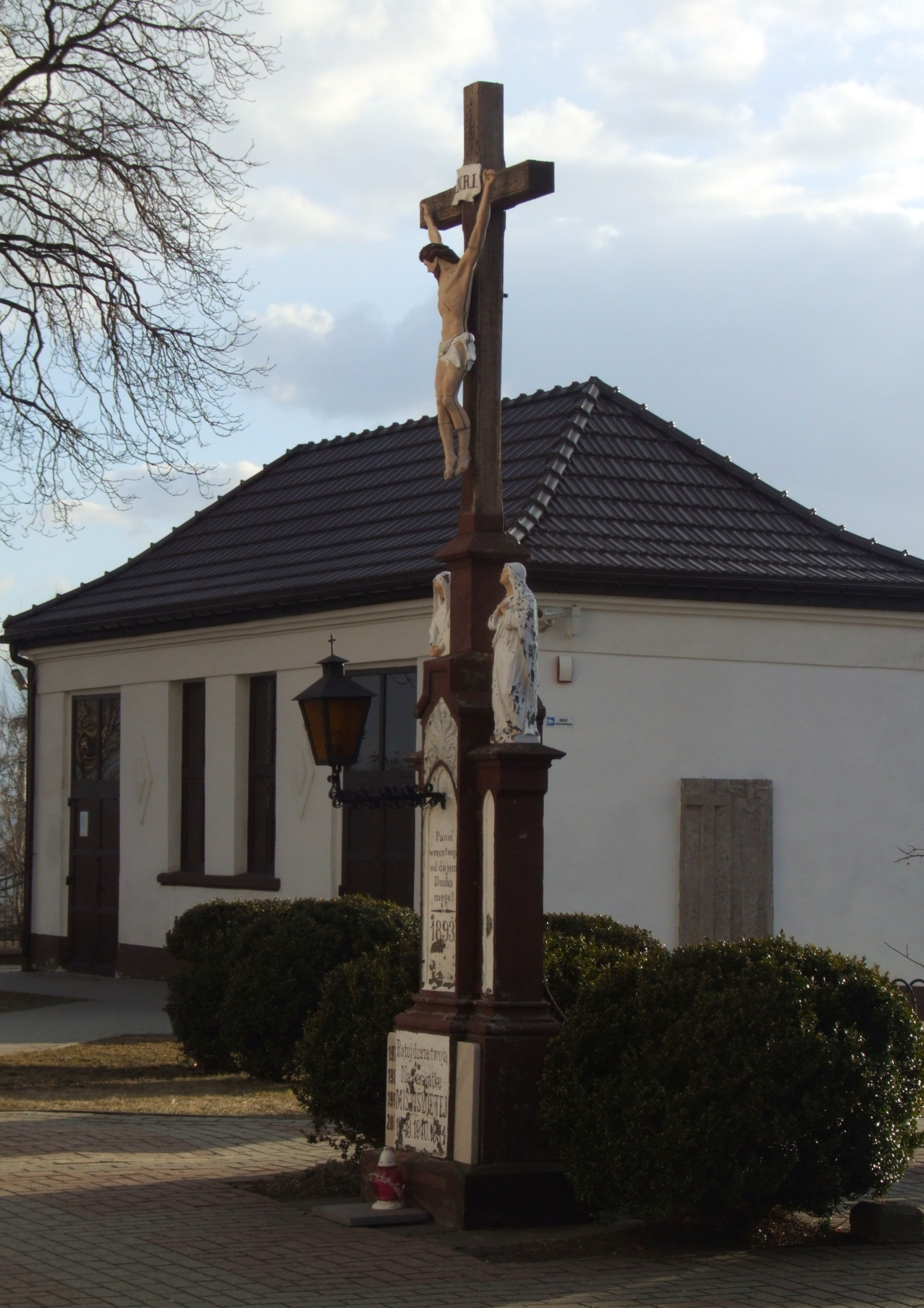 Krzyż, postawiony w 1893 roku, w czasie budowy pierwszej kaplicy w Łaziska Górnych. W tle marownia